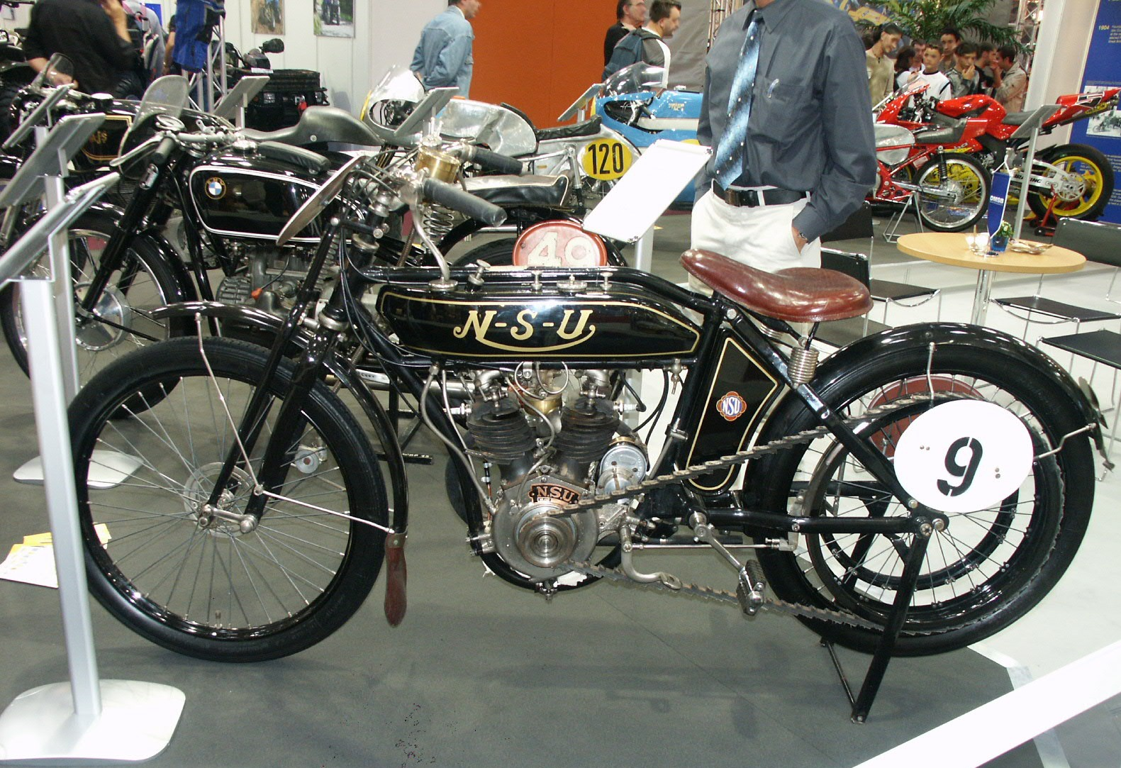 NSU Motorrad